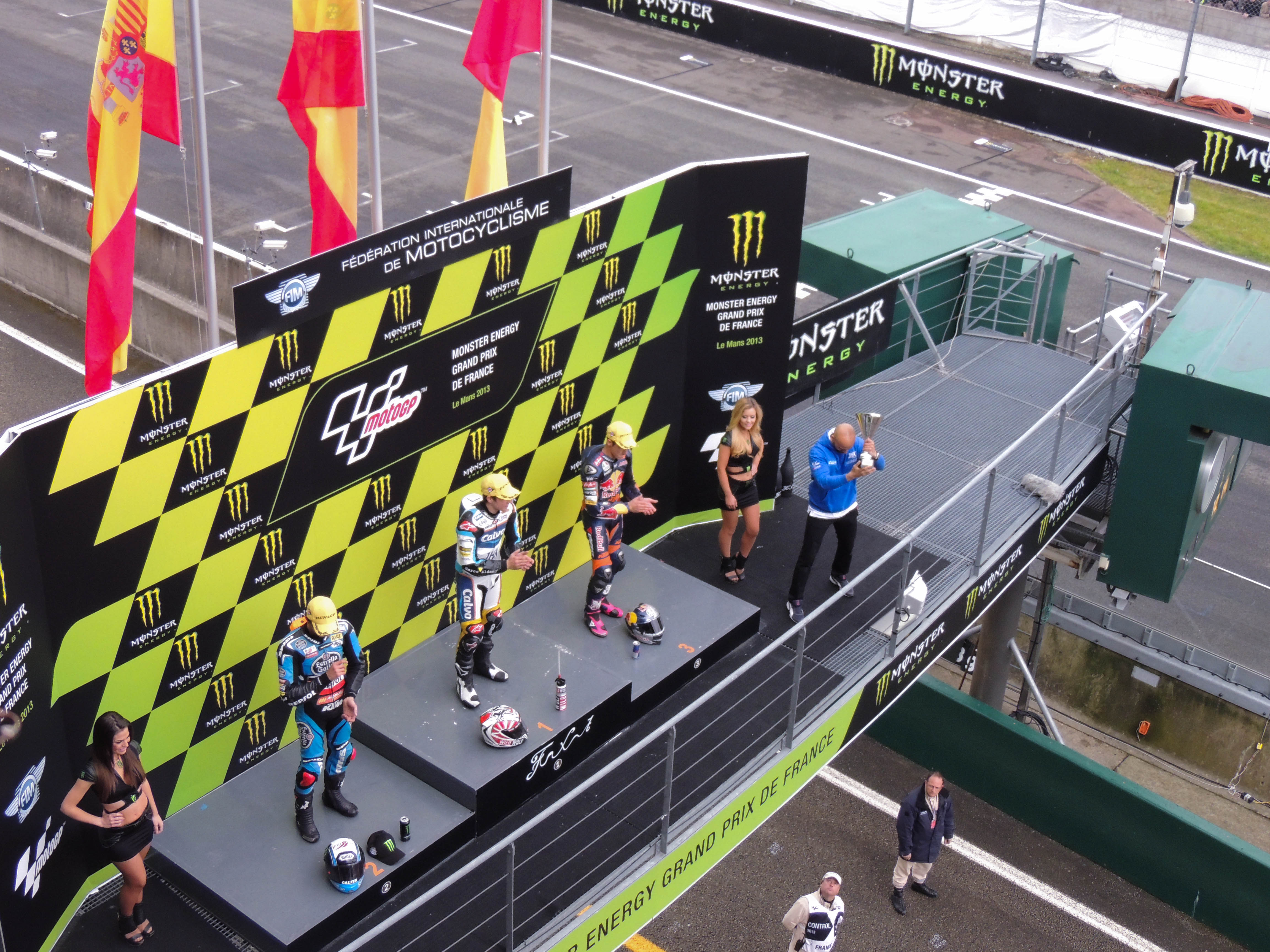 Le podium après la course dans la catégorie Moto 3.